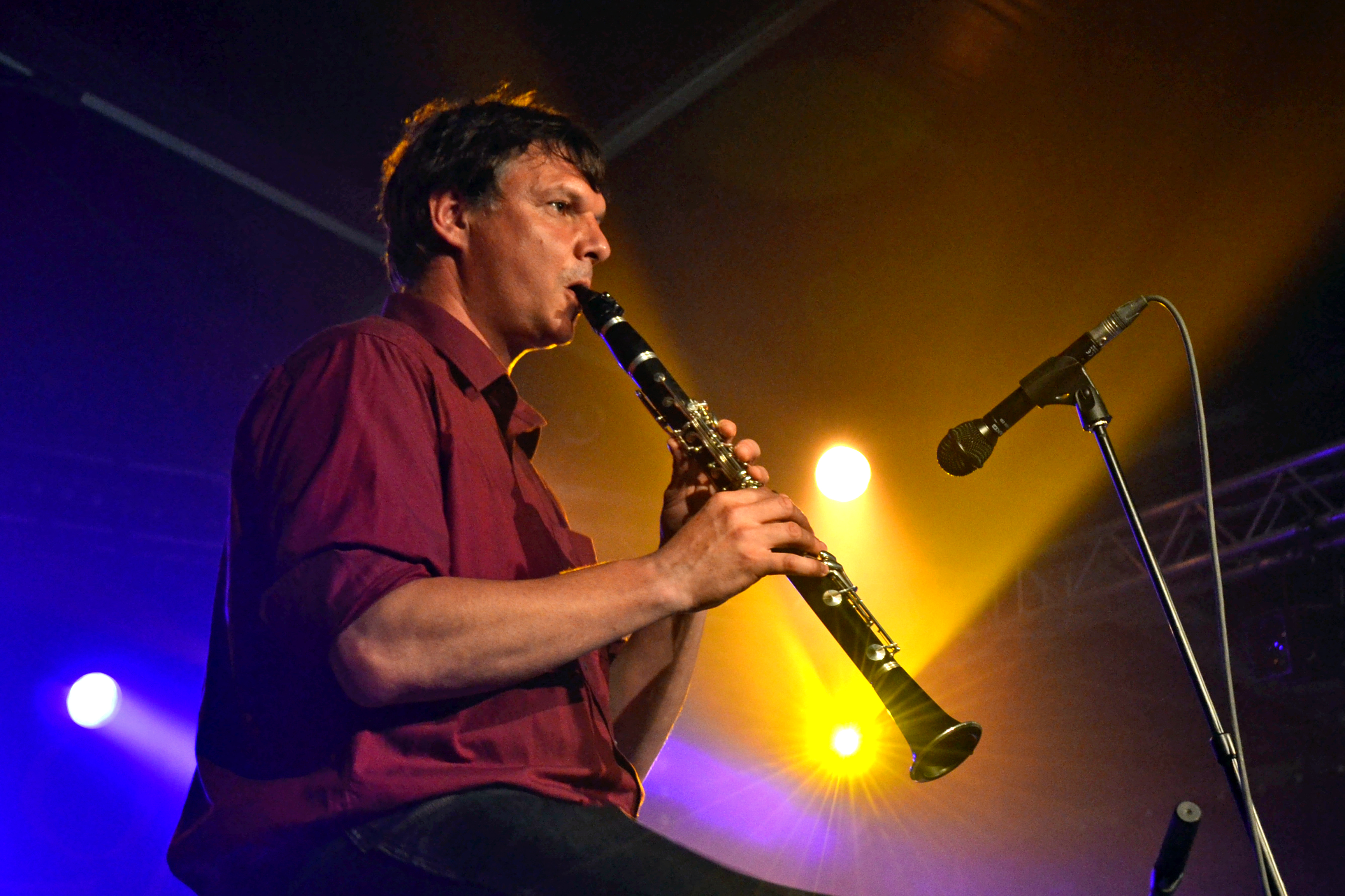 Franck Fagon à la clarinette au festival Kann Al Loar le 13 juillet 2015.